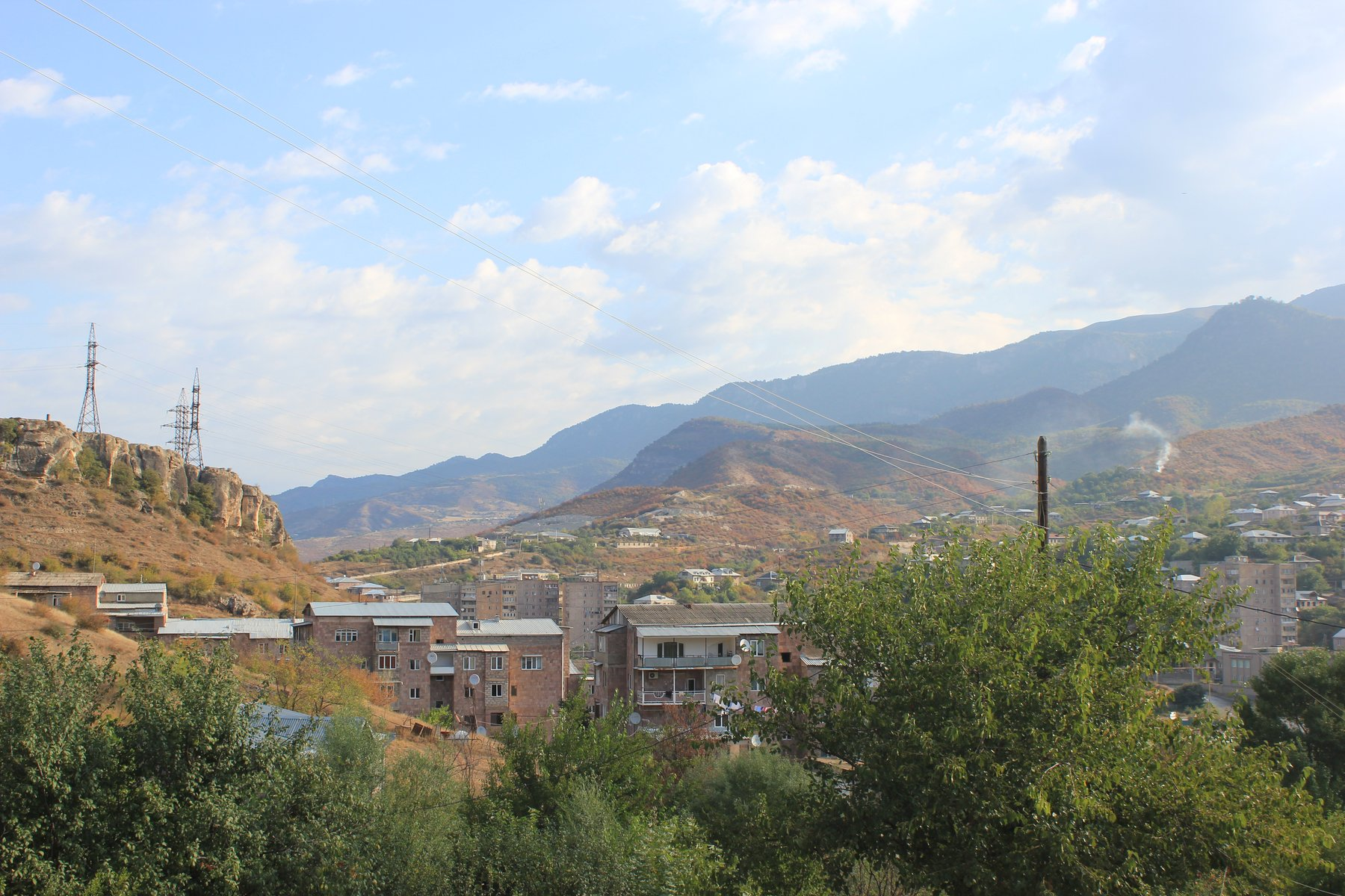 Hornjoserbsce: Idźewan, Armenska.